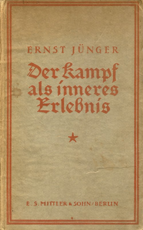 Ernst Jünger: Der Kampf als inneres Erlebnis, 1922. Erste Ausgabe von Jüngers zweiter Veröffentlichung.